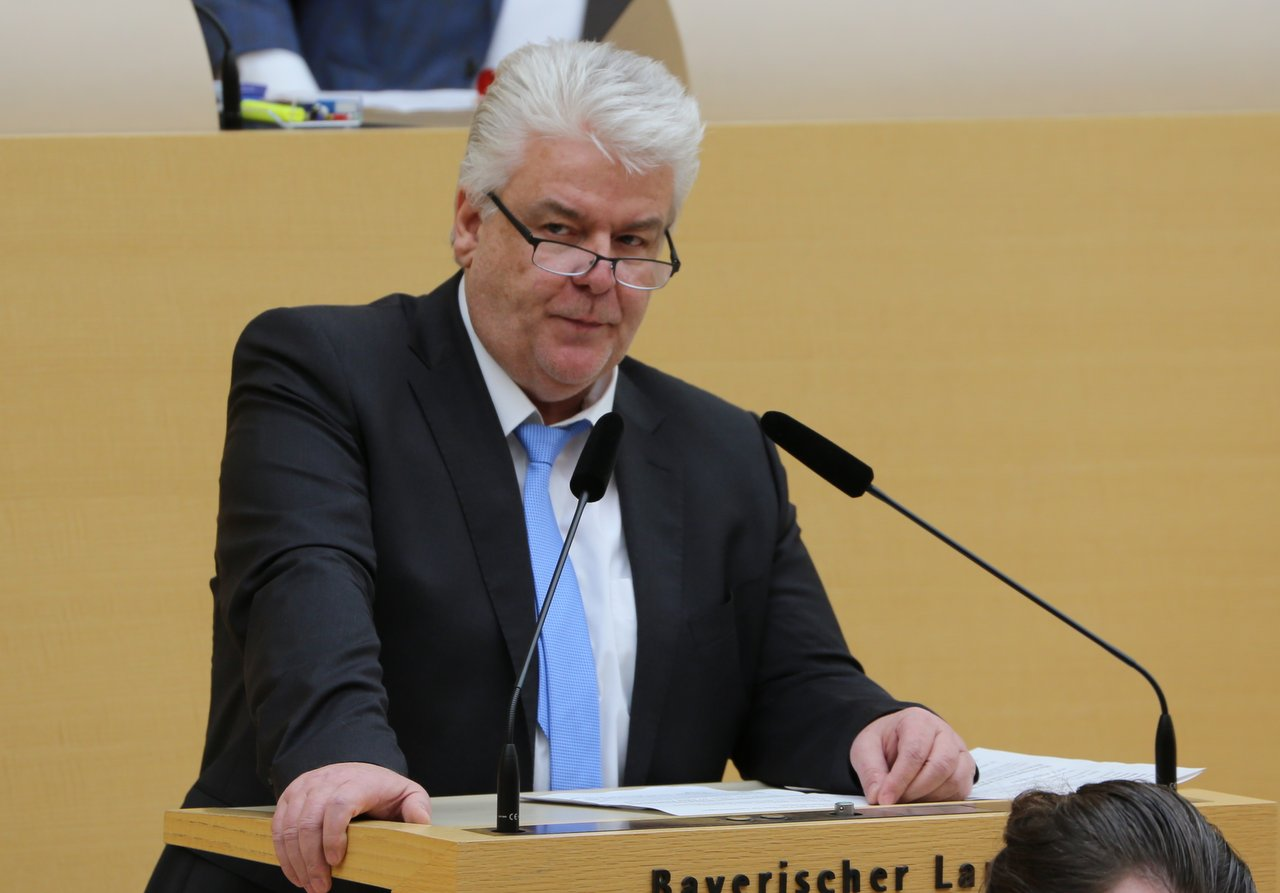 Josef Seidl, deutscher Politiker (AfD). Hier am 21. Februar 2019 während der 'Aktuellen Stunde' im Bayerischen Landtag. Titel des Werks: "Josef Seidl (AfD) - 02/2019"